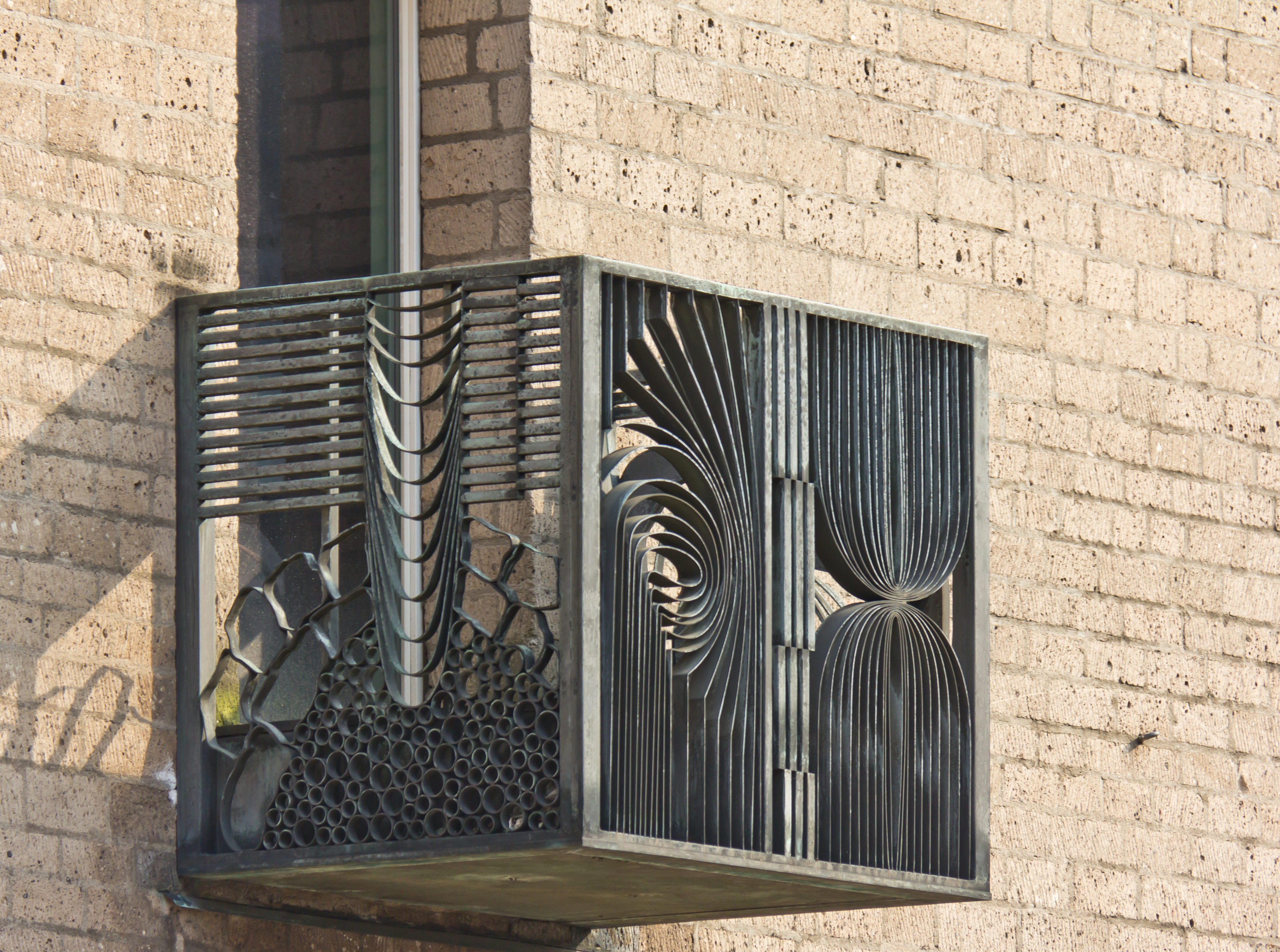 Balkon an der Prophetenkammer vom Historischen Rathaus Köln